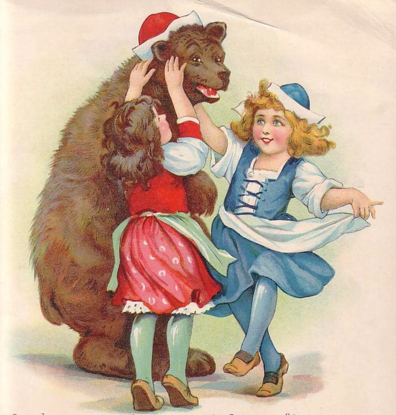 Bär und Kinder, Kinderbuchillustration von Frances Brundage